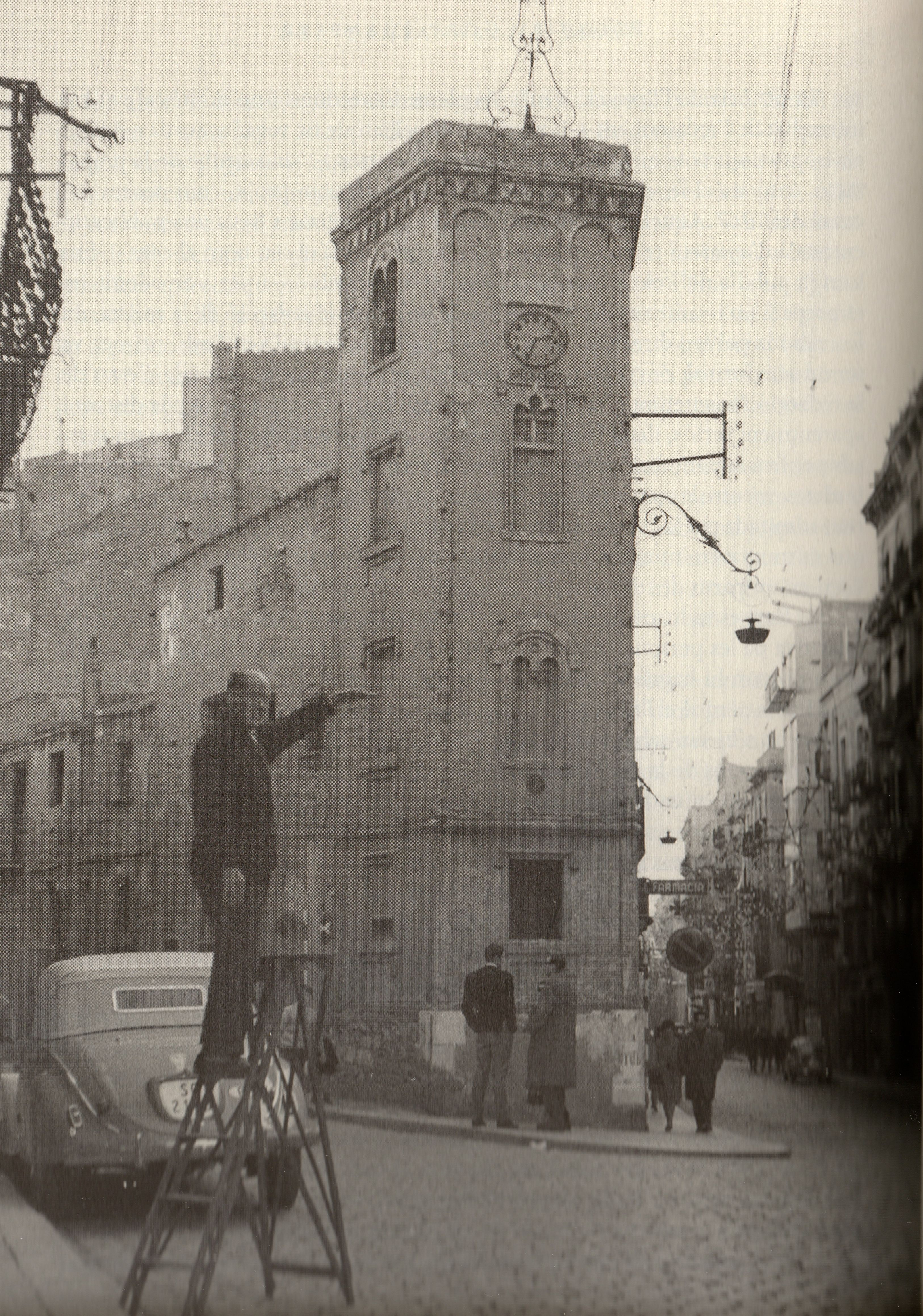 Imatge de Josep Maria Gort davant del Campanaret en actitut misteriosa